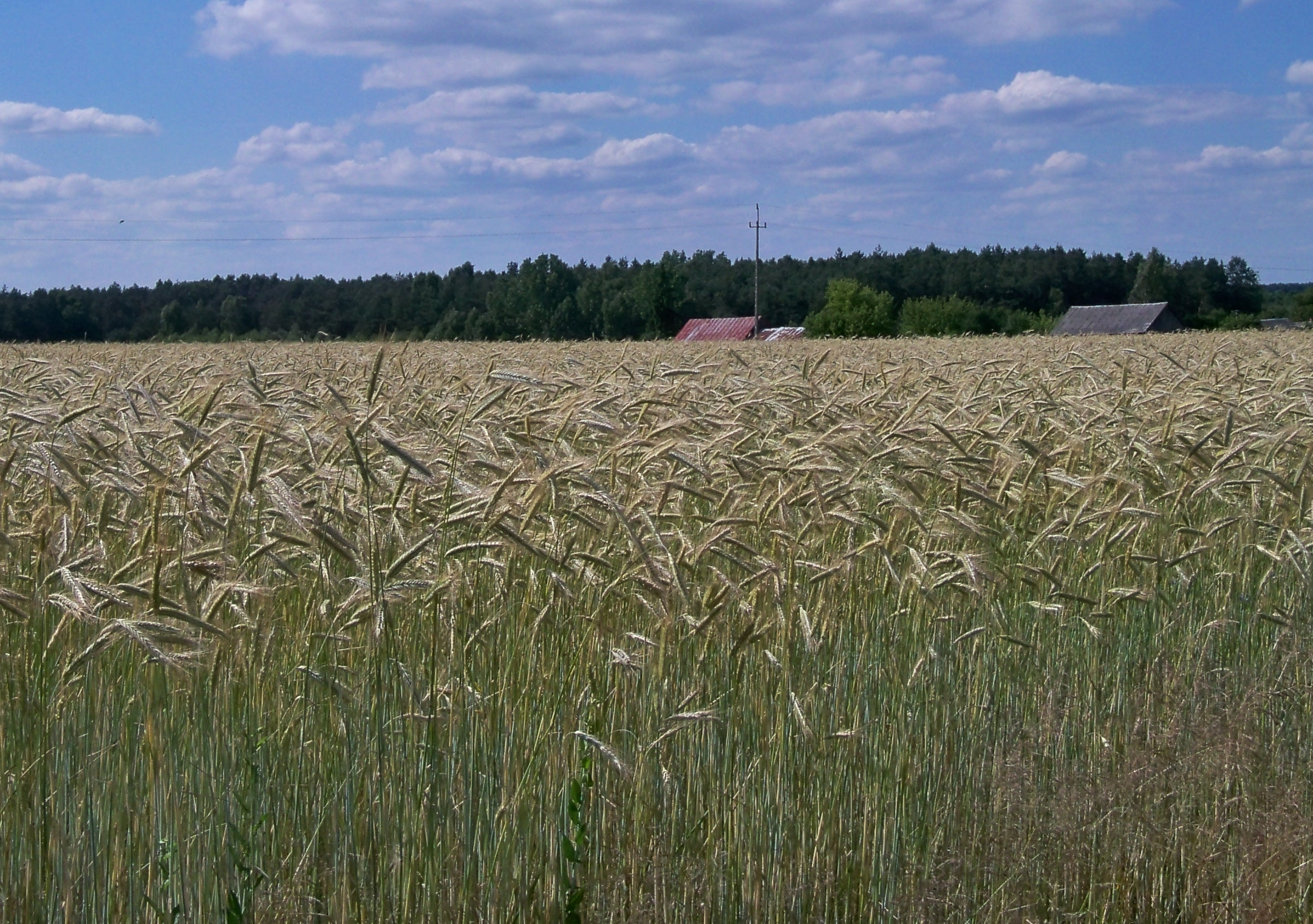 Pola między Podłączem a Górkami – przysiółkami Wólki Szelężnej k. Zwolenia